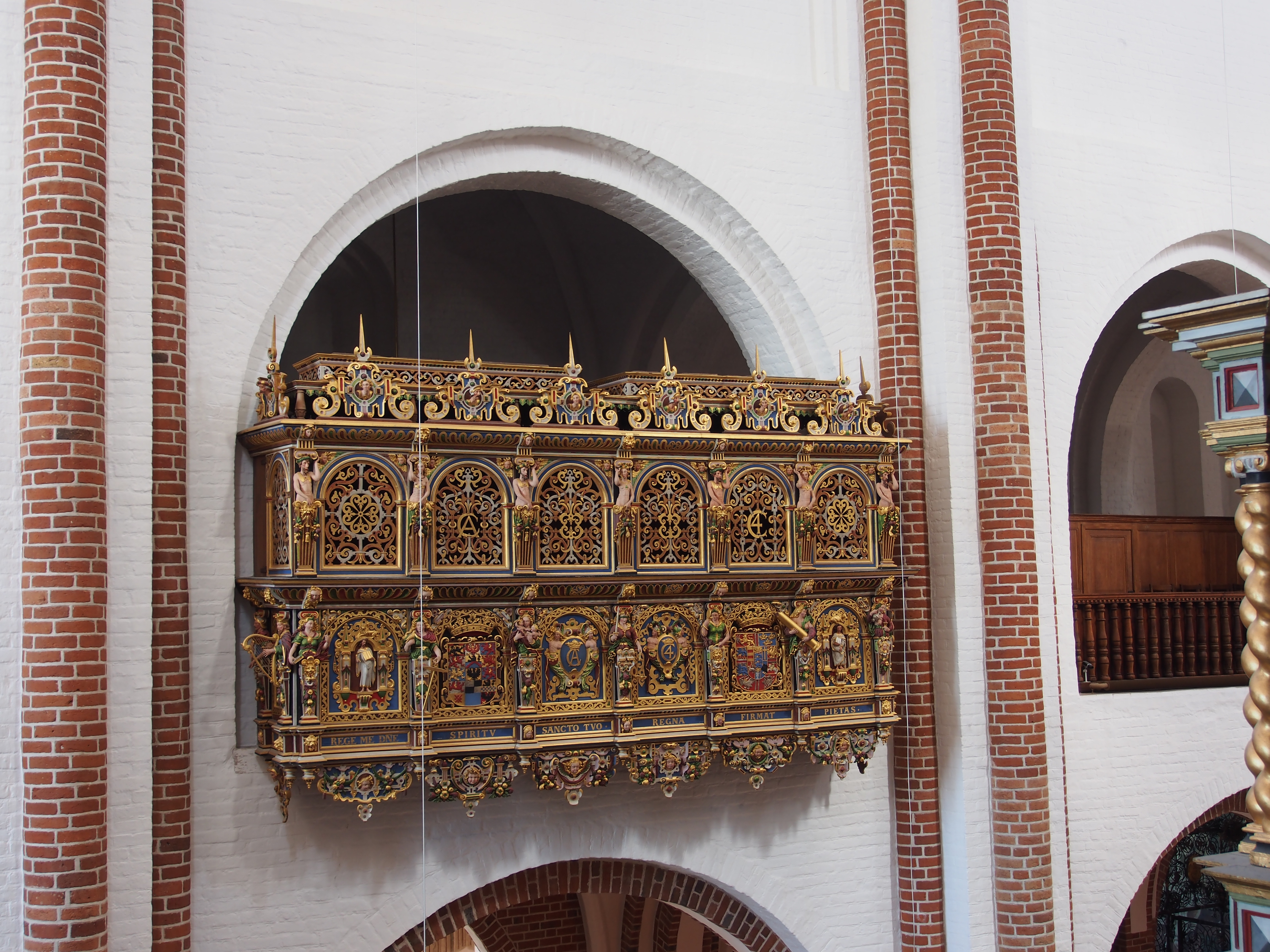 Photographed at Roskilde, Denmark.